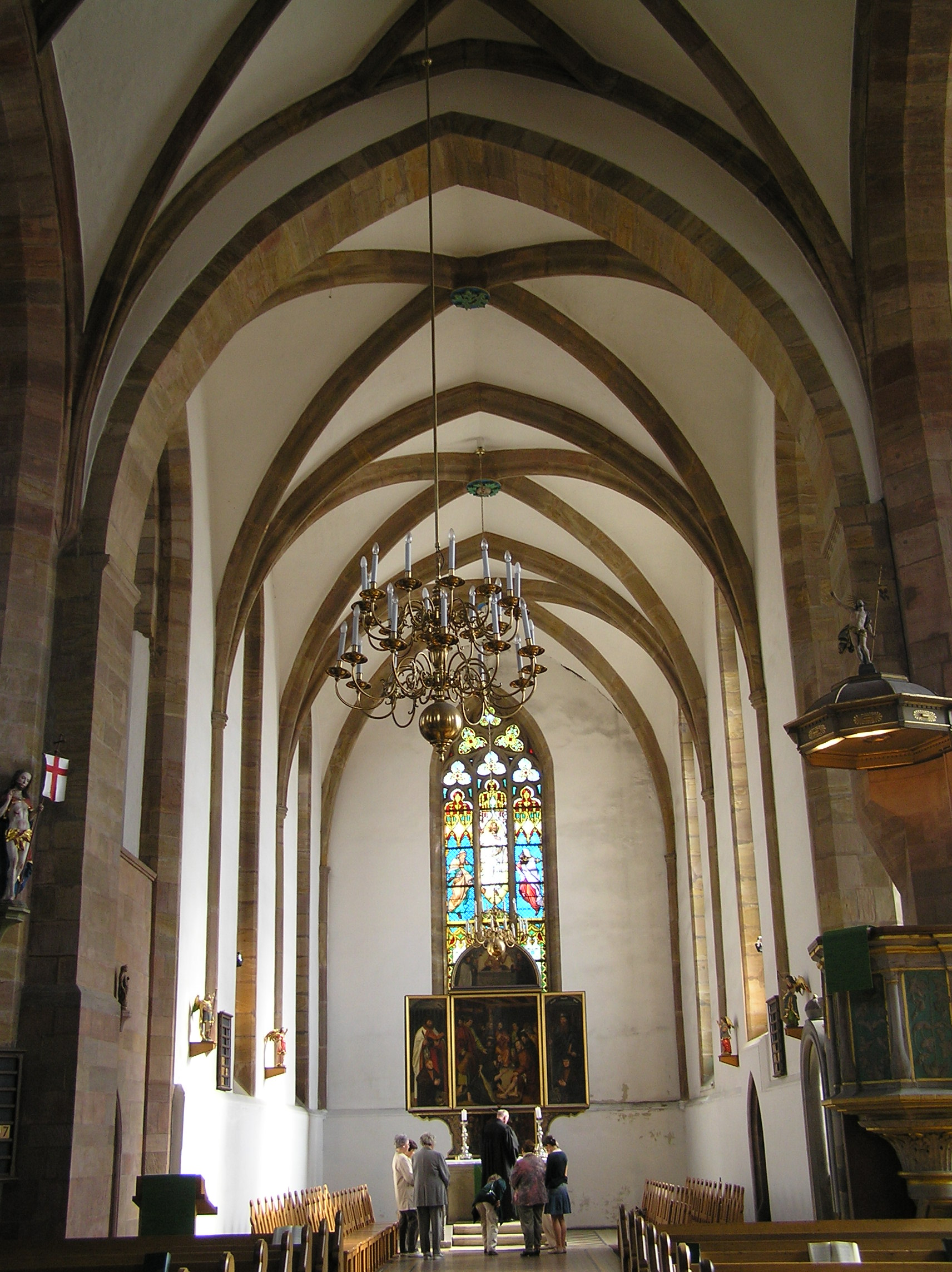 Zwickau, Katharinenkirche, Das Innere der Kirche.